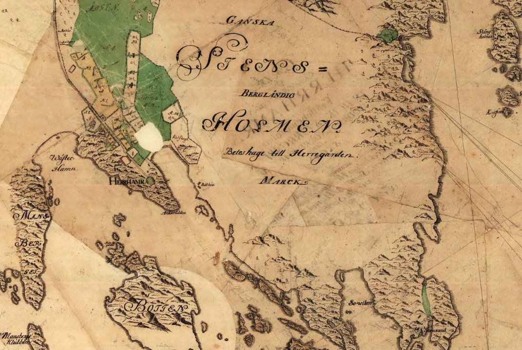 Charta över Säterigården Herrhamra i Sotholms härad, Sorunda socken (kartan är beskuren)